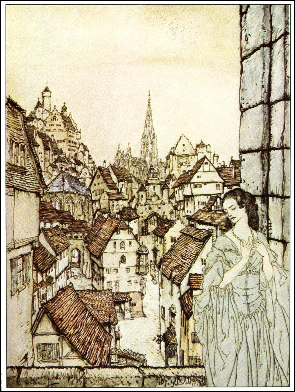 Иллюстрация Артура Рэкхема из книги "Poe's Tales of Mystery and Imagination" к рассказу Эдгара По "Лигейя"